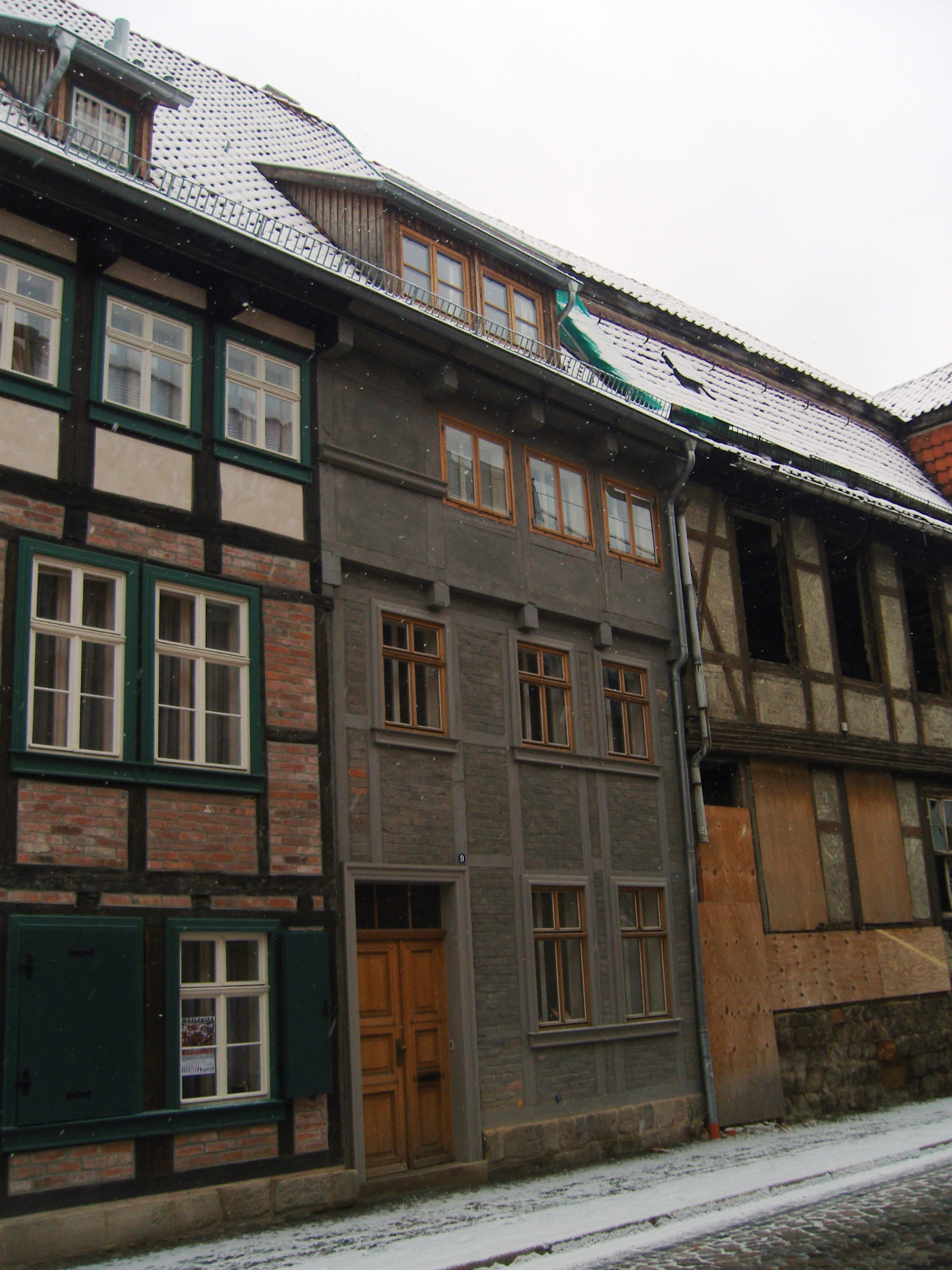 Denkmalgeschütztes Wohnhaus in der Straße Klink 9 in Quedlinburg